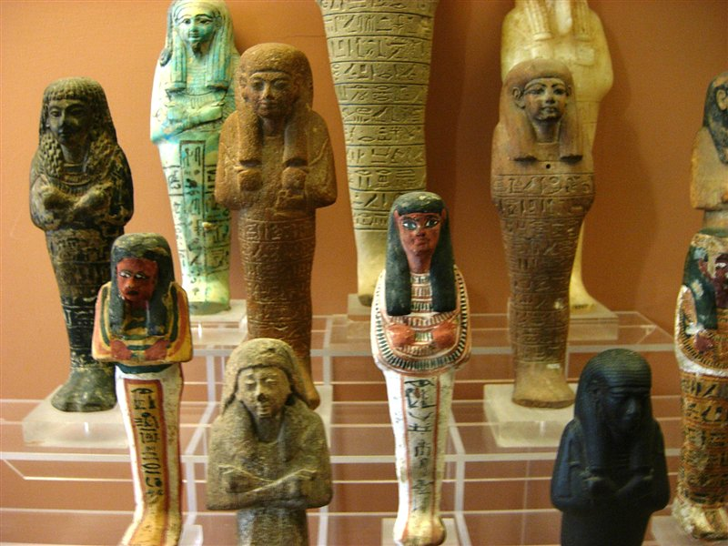 Vatican Museum Antiquities